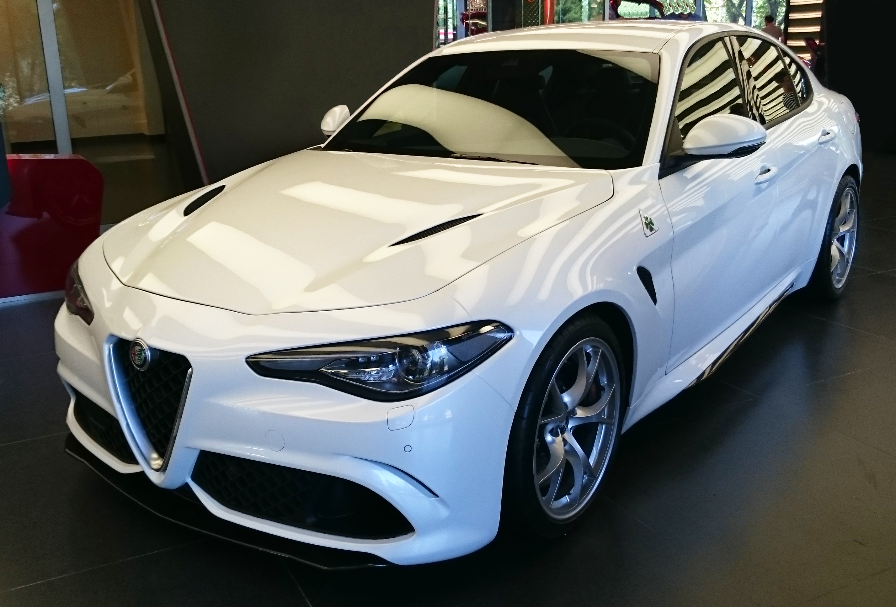 Un modello pre-serie (fatto a mano) della Alfa Romeo Giulia 2015 esposto in anteprima mondiale al rinnovato Museo Alfa Romeo di Arese in occasione dei 105 anni del marchio